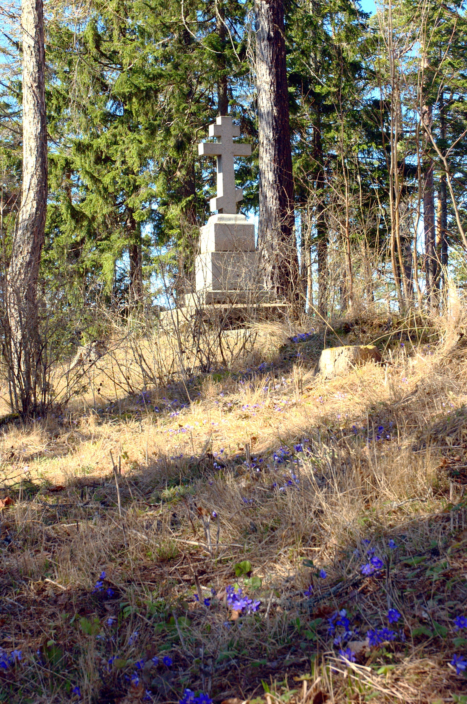 Крест преподобного Александра Свирского. Валаам. Здесь, по преданию, святой Александр желал завершить свой жизненный путь в пустынном одиночестве и молитве. Господь судил иначе.